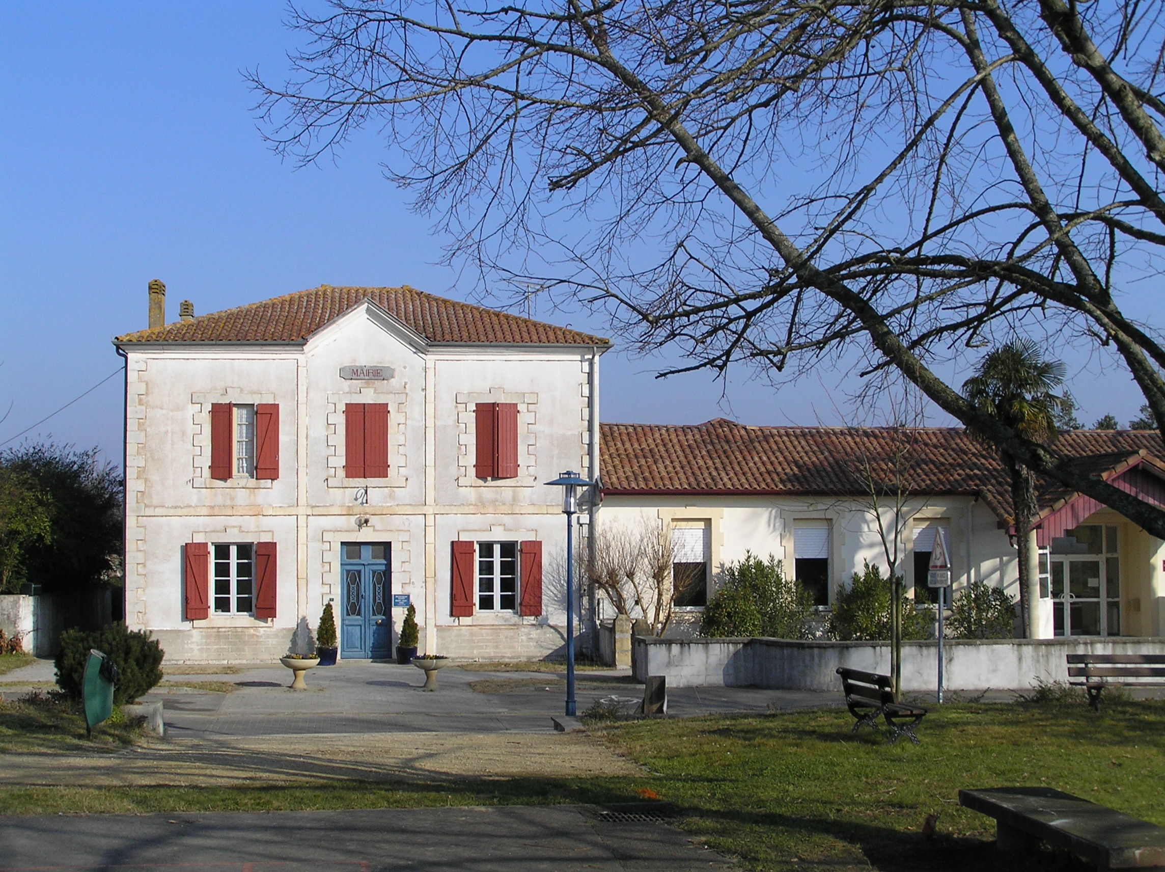 Mairie de Goos (Landes) (Photo Marclat)